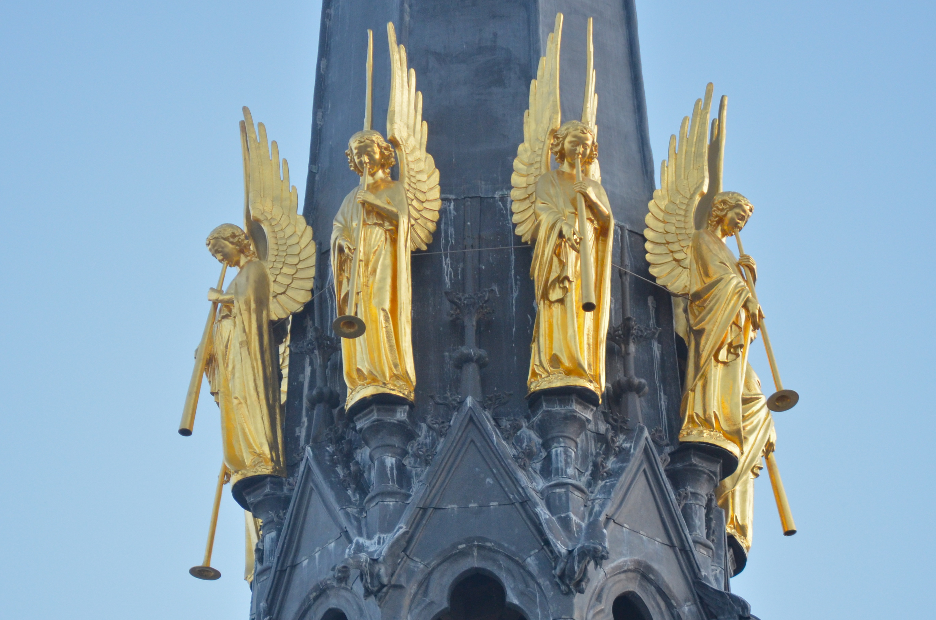 Basilique Saint-Nicolas - Nantes (Loire-Atlantique)